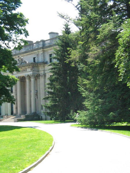 Le manoir Vanderbilt "Hyde Park"